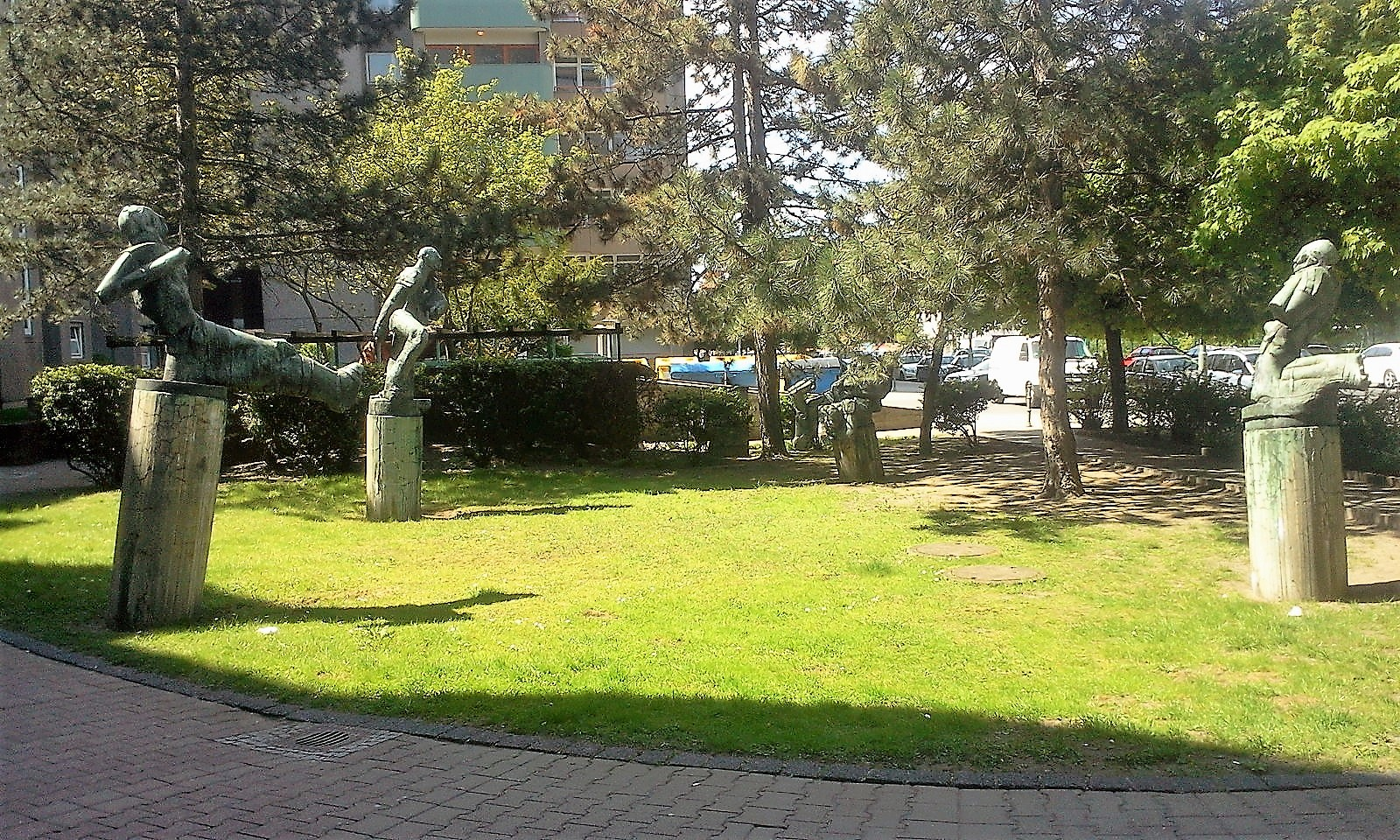 Vier Skulpturen zur Erinnerungen an das Stadion am Gesundbrunnen (Plumpe). Hier wurde Hertha BSC 1930 und 1931 Deutscher Fußballmeister.